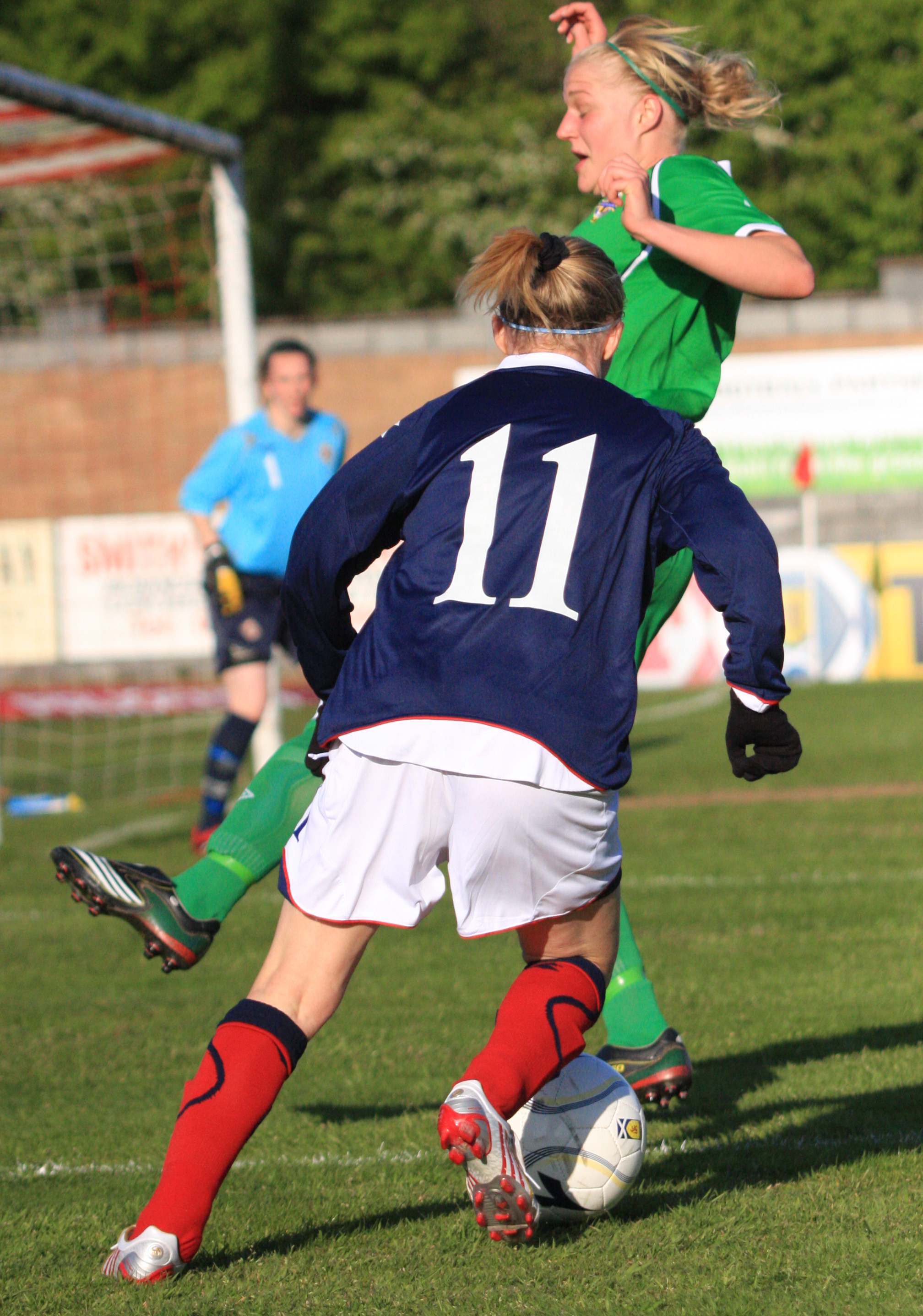 IMG_5392 IMG_5392